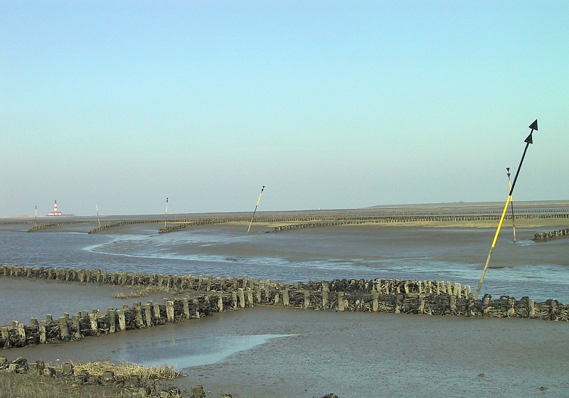 Landgewinnung an der Nordsee, Eiderstedt, Westerhever, Deutschland, Germany